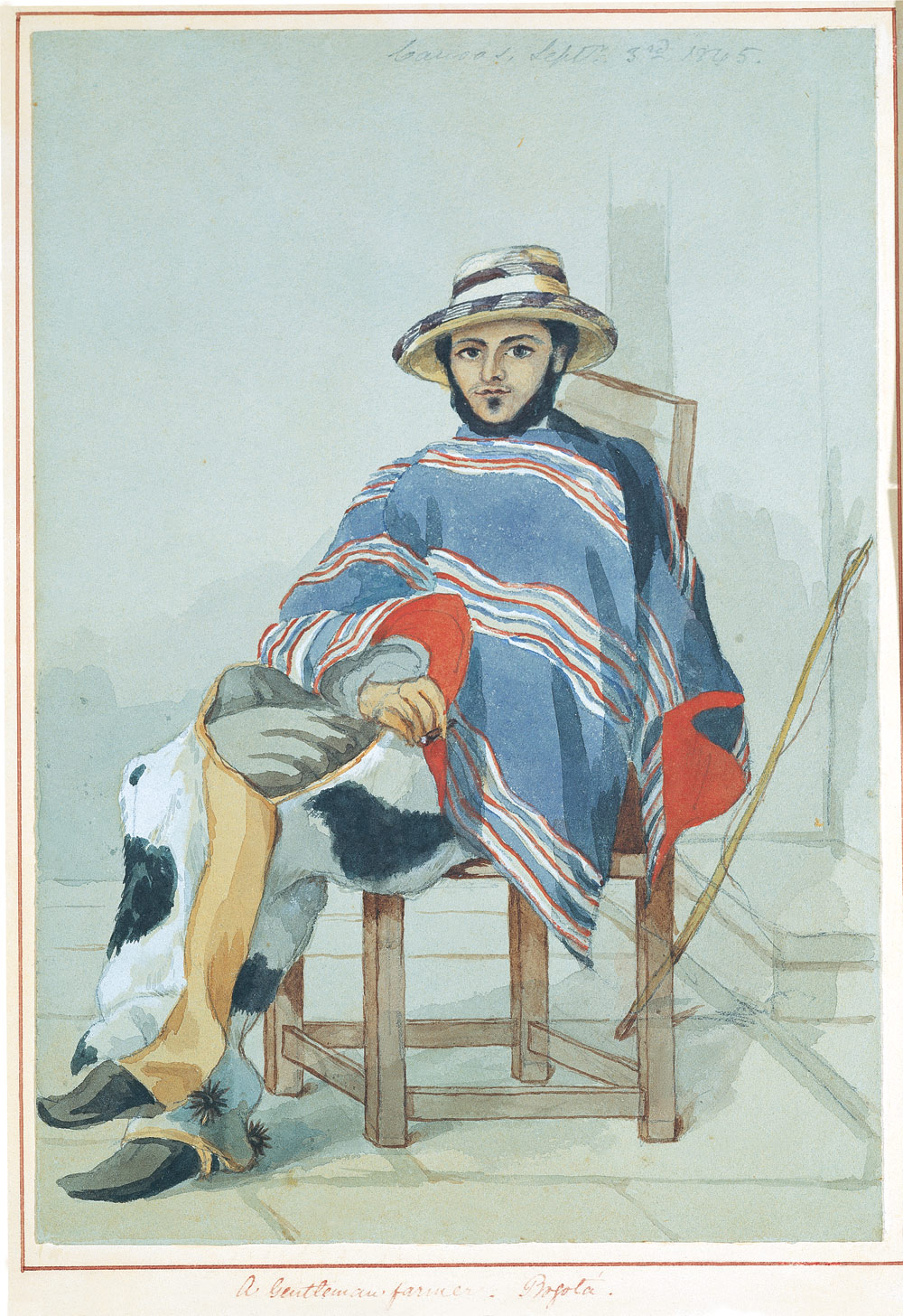 TÍTULO Hacendado de Bogotá ARTISTA Edward Walhouse Mark NÚMERO DE REGISTRO AP0091 FECHA DE INGRESO A LA COLECCIÓN Miércoles, Diciembre 18, 1957 TÉCNICA Acuarela sobre papel DENOMINACIÓN Acuarela DIMENSIONES 25 x 17,3 cm